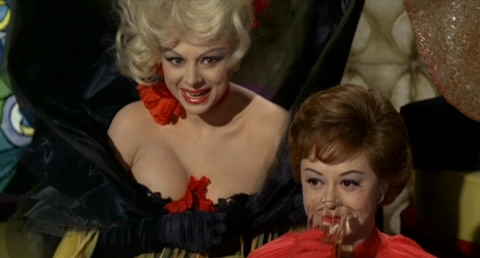 Képkocka a „Júlia és a szellemek” című filmből